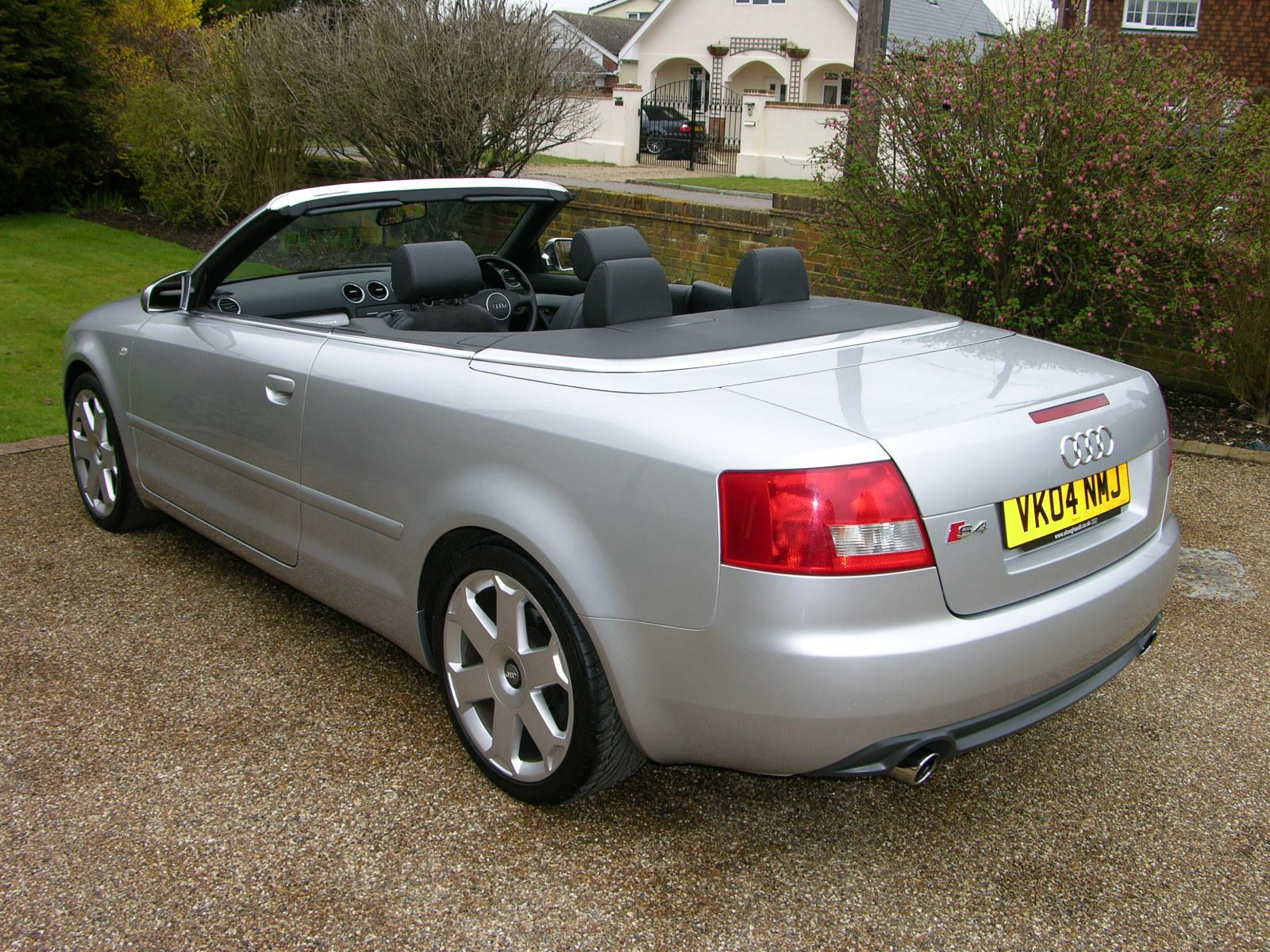 Audi S4 Cabriolet